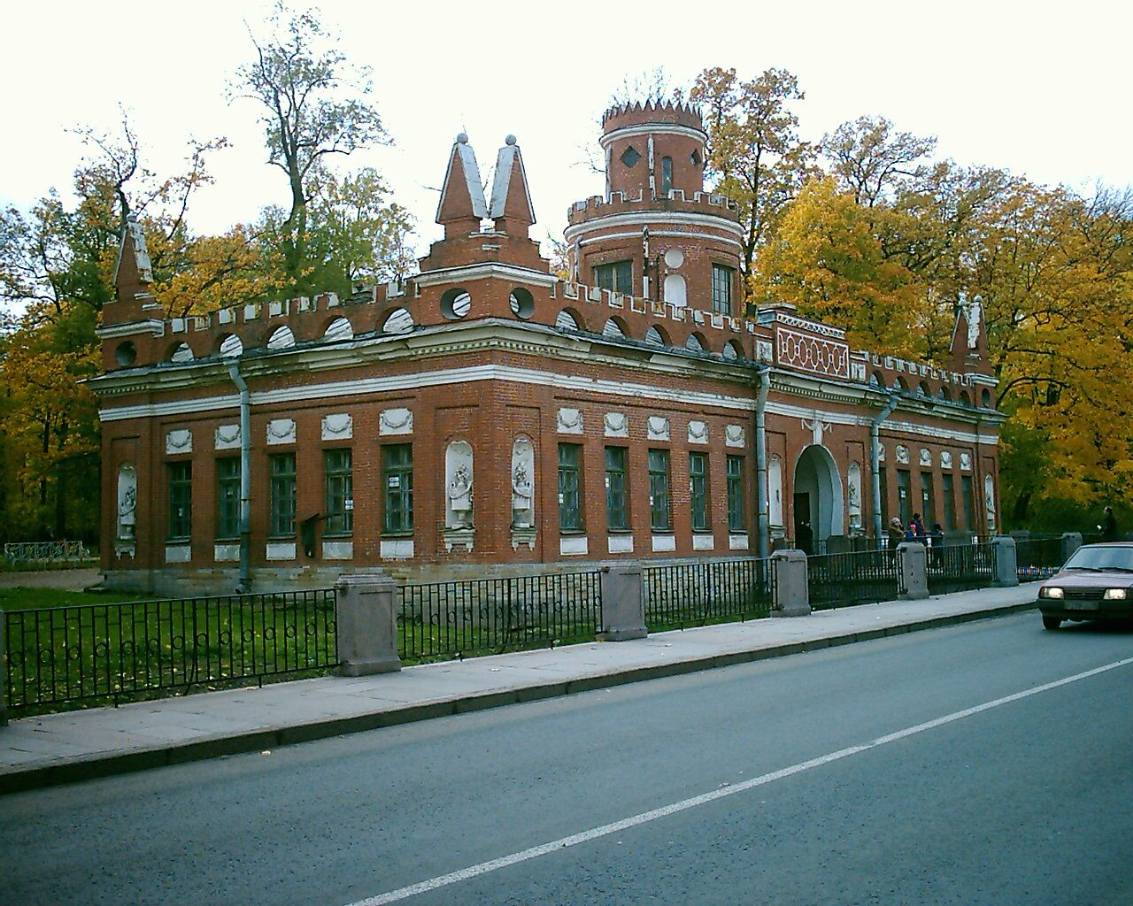 Эрмитажная кухня: на берегу Каскадного канала, Пушкин, Пушкинский район, Санкт-Петербург